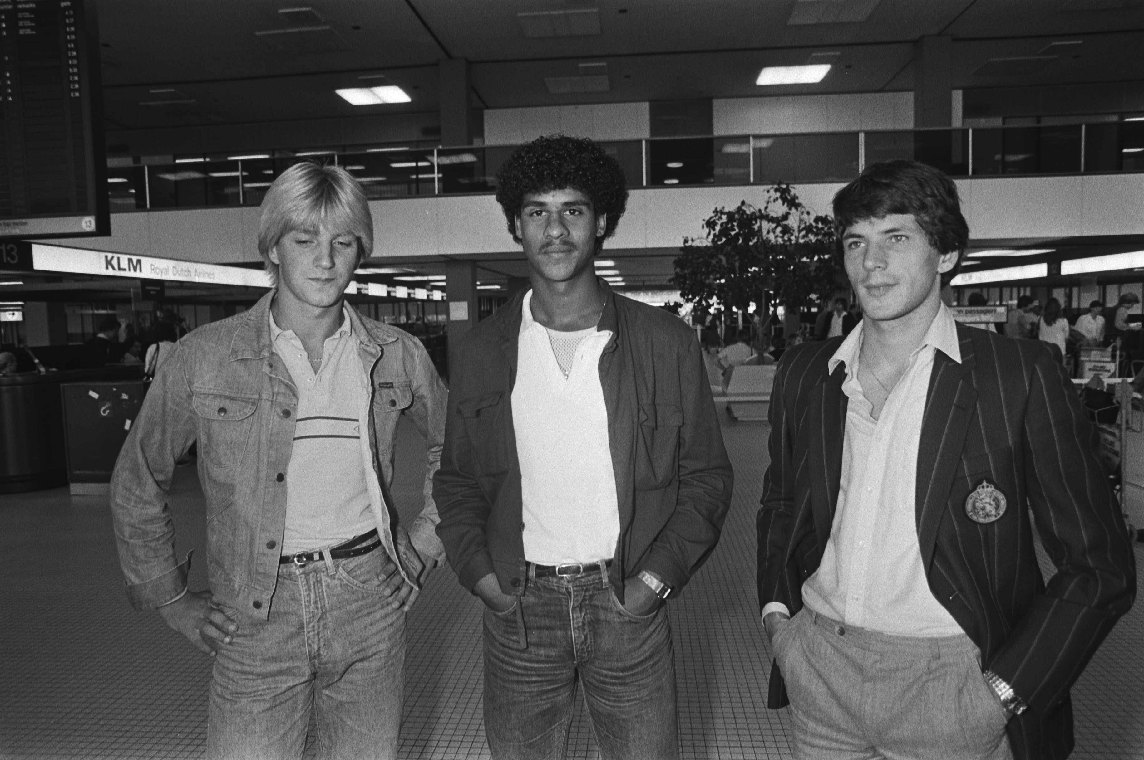 Collectie / Archief : Fotocollectie Anefo Reportage / Serie : Vertrek Nederlands elftal naar Zwitserland vanaf Schiphol Beschrijving : Voetballers Wim Kieft (Ajax), Frank Rijkaard (Ajax) en Willy Janssen (PSV) in gesprek op luchthaven Schiphol Datum : 31 augustus 1981 Locatie : Noord-Holland, Schiphol, Zwitserland Trefwoorden : Nederlands elftal, interlands, sport, voetbal, voetballers, wedstrijden Persoonsnaam : Janssen, Willy, Kieft, Wim, Rijkaard, Frank Fotograaf : Dijk, Hans van / Anefo, [onbekend] Auteursrechthebbende : Nationaal Archief Materiaalsoort : Negatief (zwart/wit) Nummer archiefinventaris : bekijk toegang 2.24.01.05 Bestanddeelnummer : 931-6520